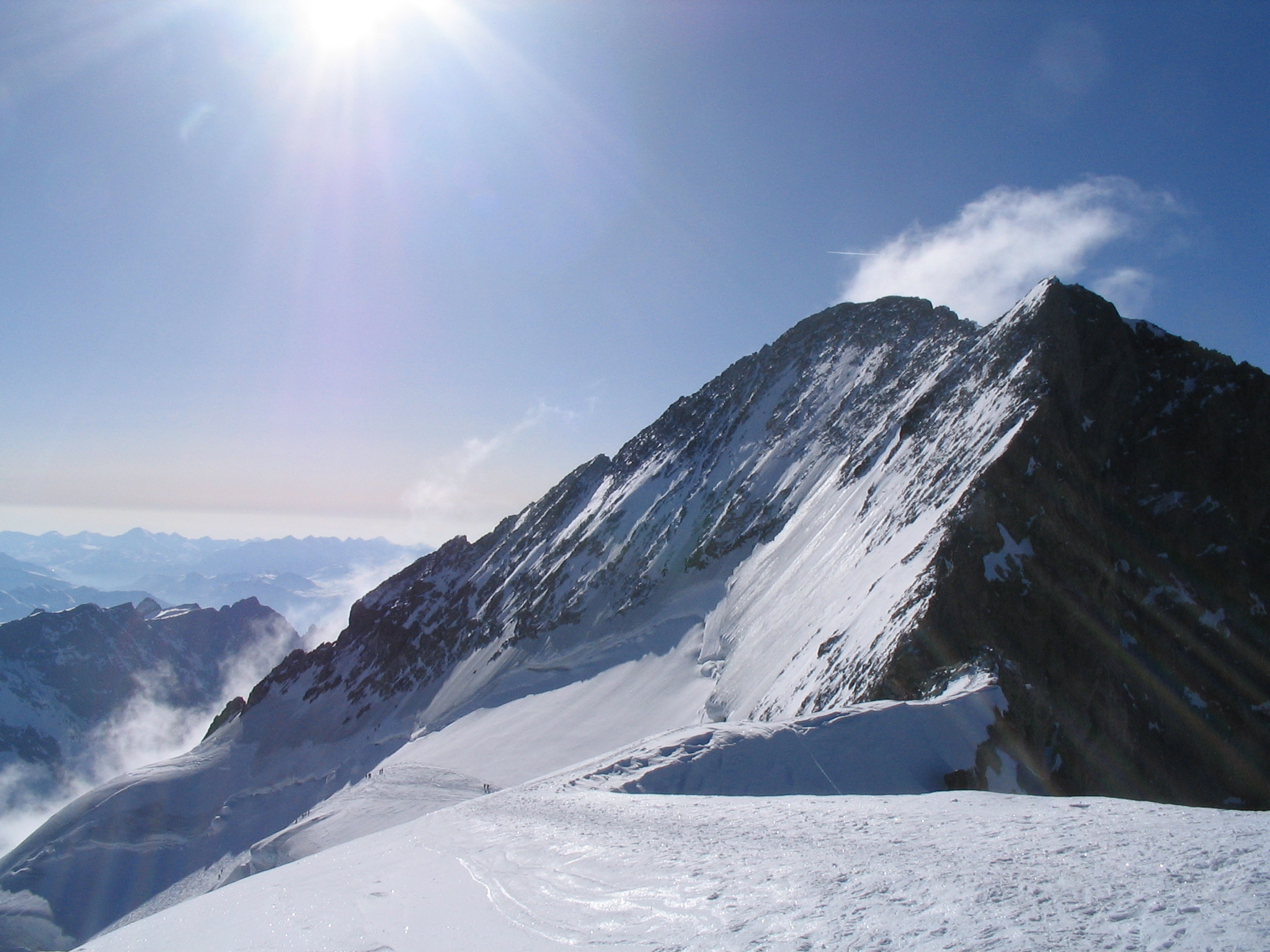 La barre des écrins (4102m) depuis le dôme de neige des écrins (4015m). Avril 2006 Licensing Catégorie:Sommet des Alpes françaises Catégorie:Massif des Écrins catégorie:montagne